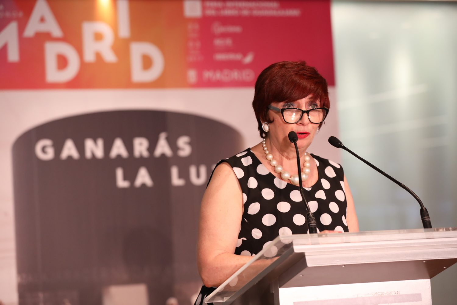 Con motivo de la celebración de la 31 Feria Internacional del Libro de México (FIL) que se celebra en Guadalajara del 25 noviembre al 3 diciembre de 2017, Madrid, que será la ciudad invitada, desarrollará un amplio programa cultural (artes plásticas, música, cine y teatro), literario, académico y profesional. Las actividades estelares del “invitado de honor” se realizan en el recinto ferial, en un pabellón de 1.800 metros cuadrados que Madrid levantará para desarrollar foros literarios, encuentros comerciales de la industria editorial y la promoción cultural y turística de la ciudad.